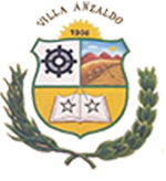 es una foto sacada por mi